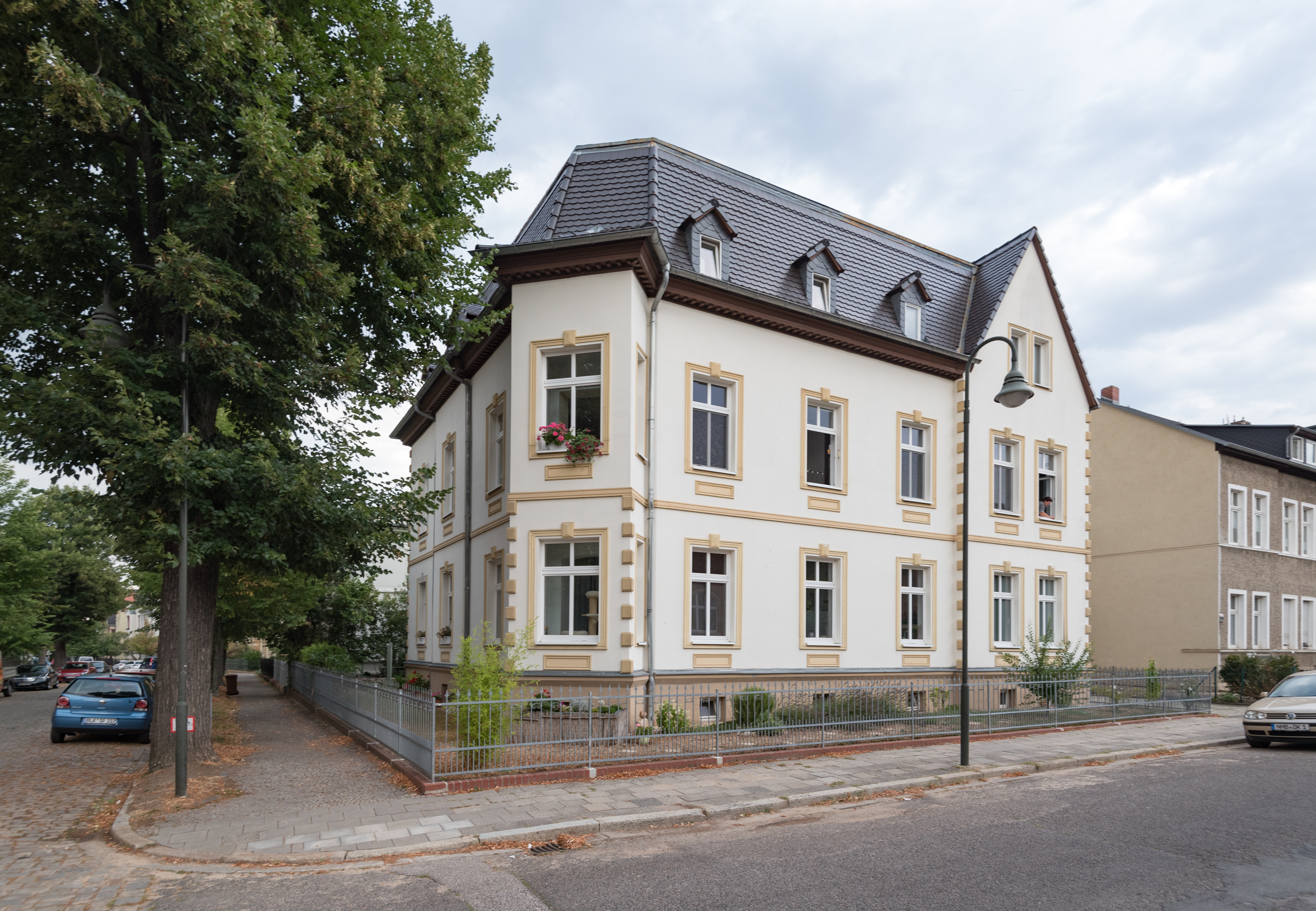 Naumburg (Saale), Parkstraße 21